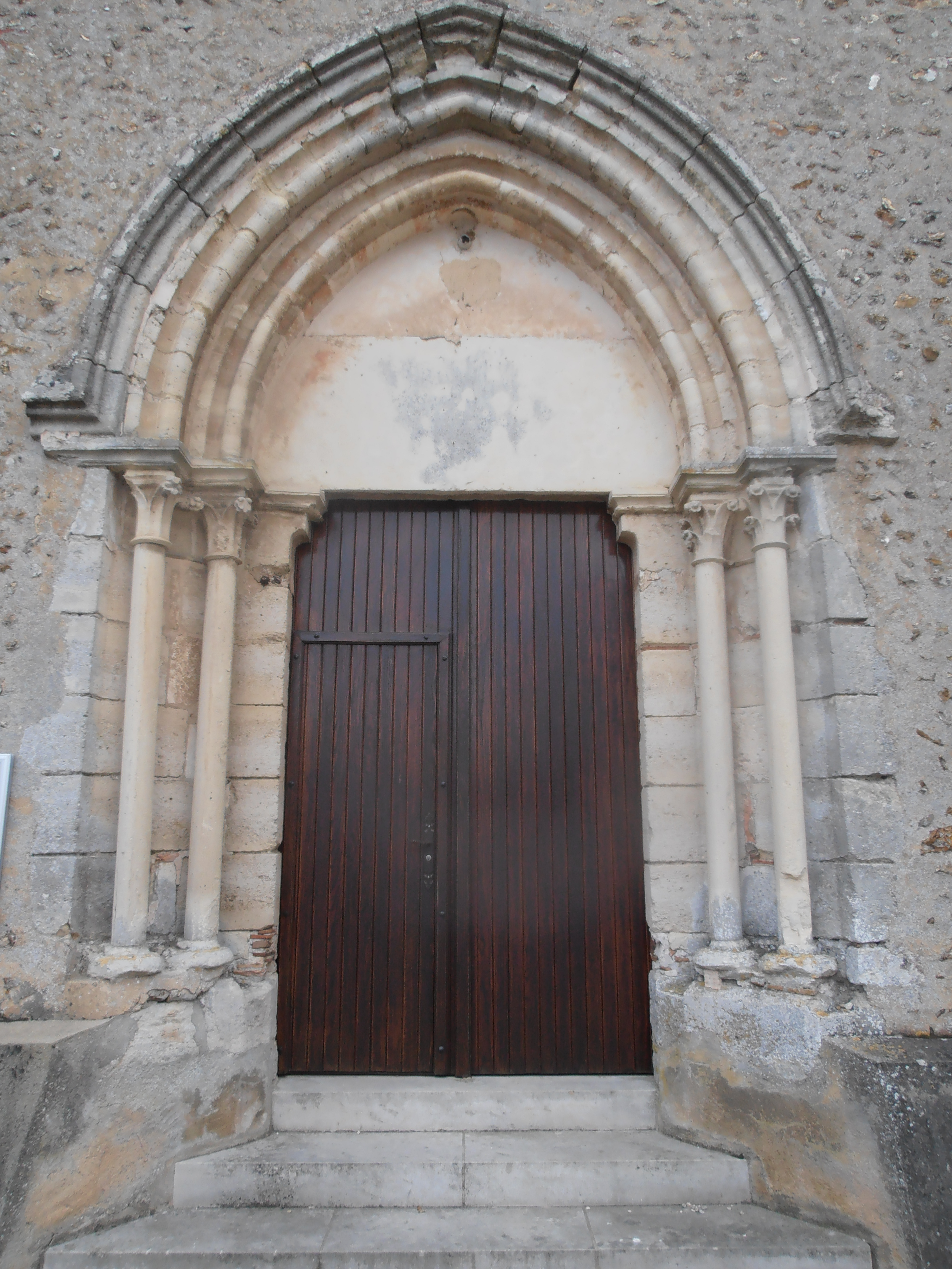 Portail de Bussy le Repos (Yonne) France